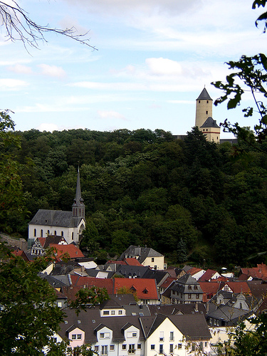 Stromberg/Hunsrück, Blick auf Burg Stromberg mit Altstadt und ev. Kirche